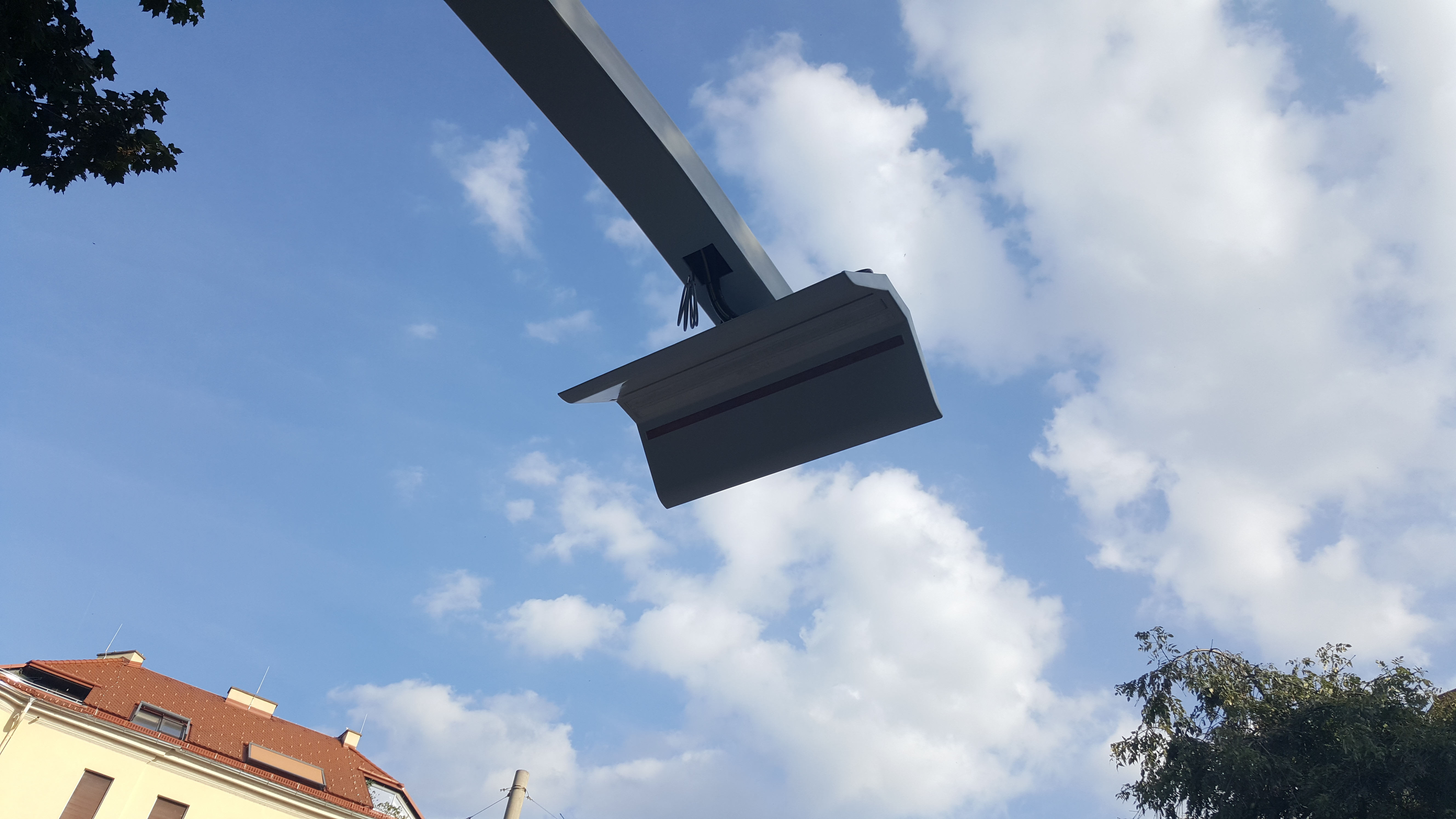 Ladestation für Elektrobusse an der Grazer Haltestelle Museum der Wahrnehmung